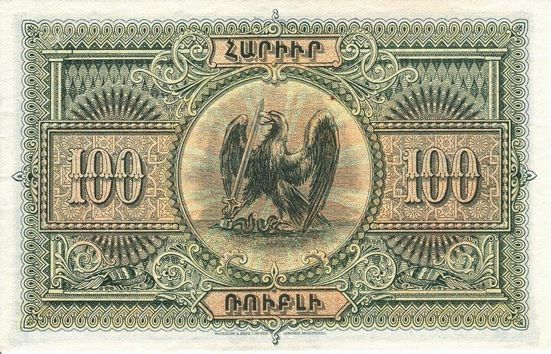 100 rublos